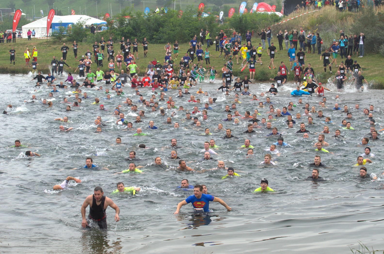 Das Hindernis "Vollwaschgang" lässt die Teilnehmer direkt ins kühle Wasser des Markkleeberger Sees springen.